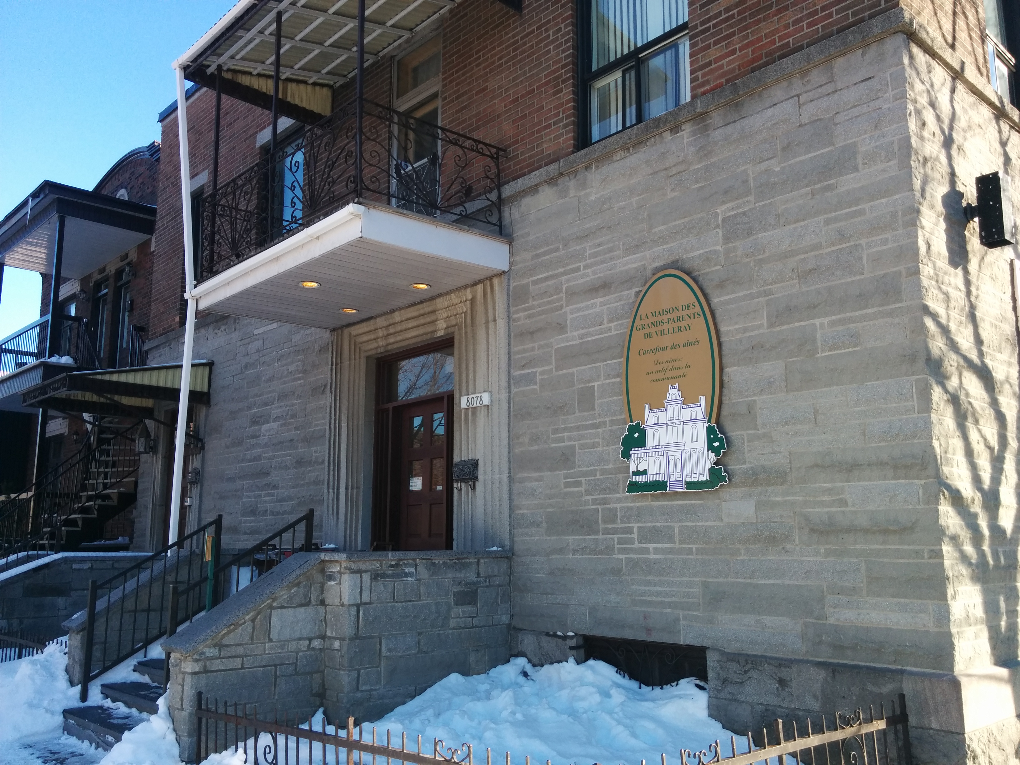 La Maison des Grands-Parents de Villeray, 8078 Rue Drolet. Photo prise dans le cadre du mois de la contribution 2017, Montréal, Villeray.